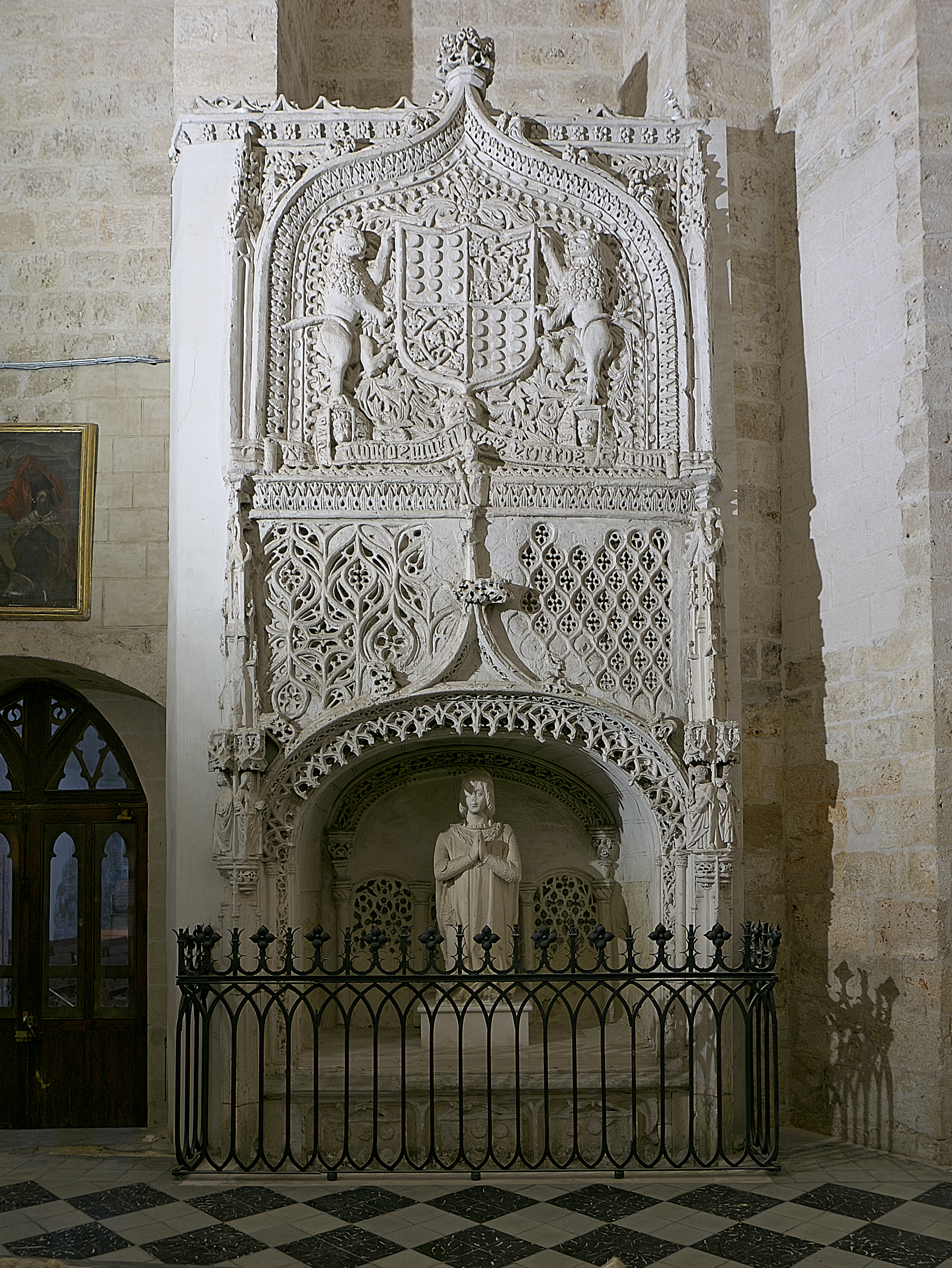 Iglesia de San Francisco (Palencia). Capilla funeraria de García Fernández Sarmiento, III Adelantado Mayor de Galicia, tercer señor de Fuentes de Valdepero. No existe documentación sobre la identificación del personaje sepultado, caballero de la Orden de Malta, con escudero y paje en la estatuaria original, y referencia a un tal Juan Sarmiento. El sepulcro está datado hacia 1500, trabajado por un yesero de Carrión, Alonso Martínez en gótico isabelino con potente escudo de los Sarmiento.